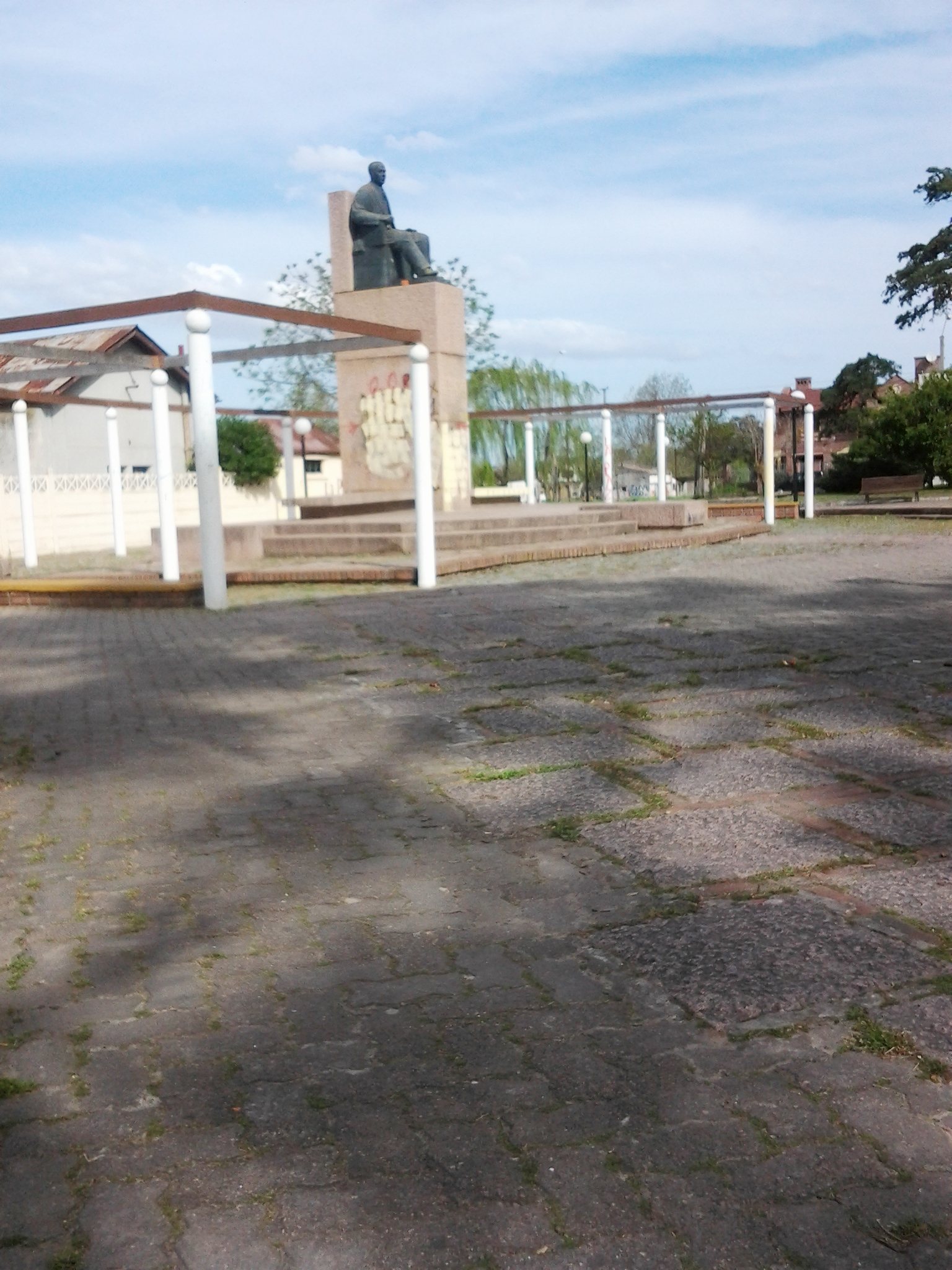 Monumento a César Mayo Gutiérrez en la Plaza de La Paz (Canelones - Uruguay)